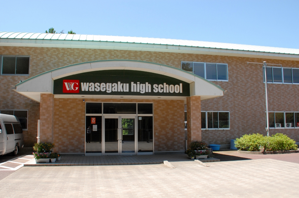 わせがく高等学校多古本校